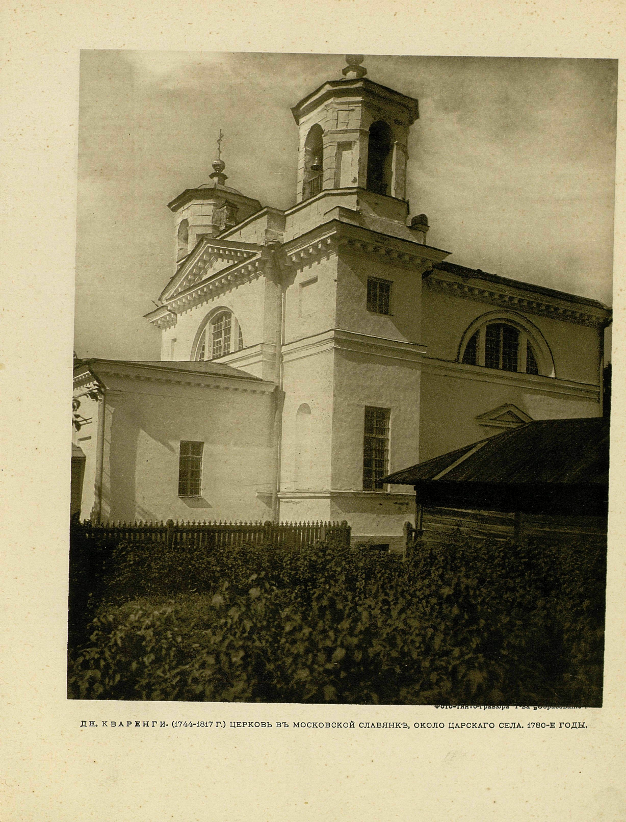 Церковь во имя Преображения Господня в Московской Славянке.